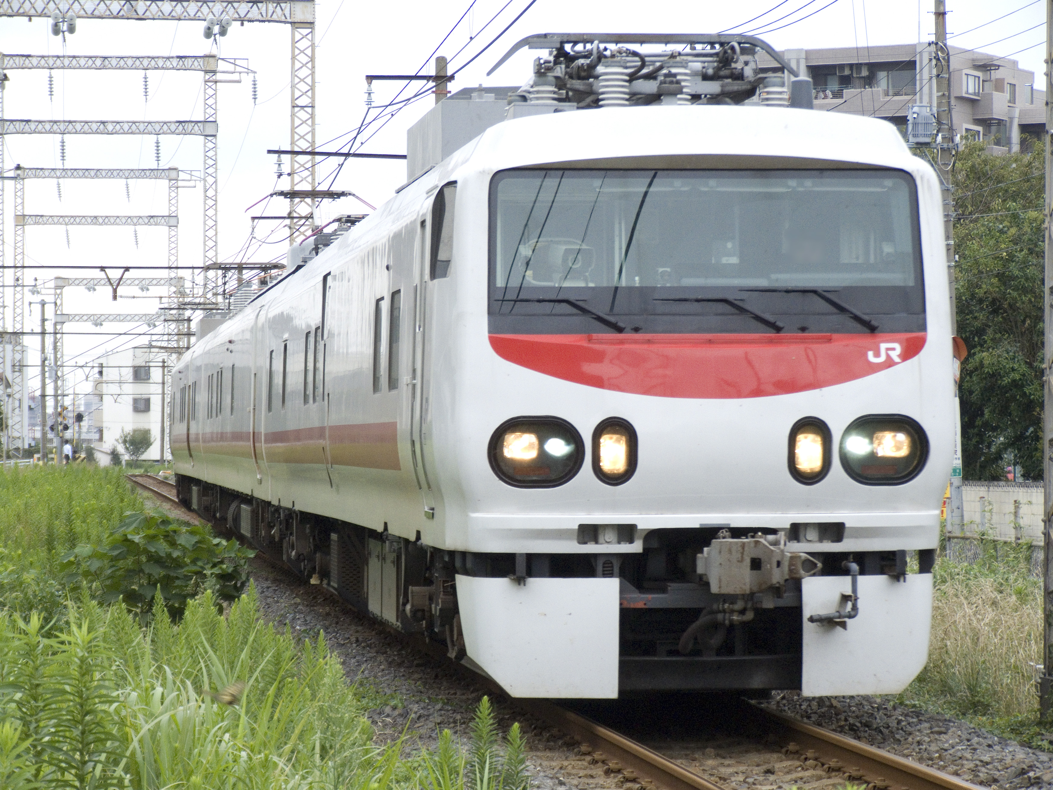 JR東日本E491系電車